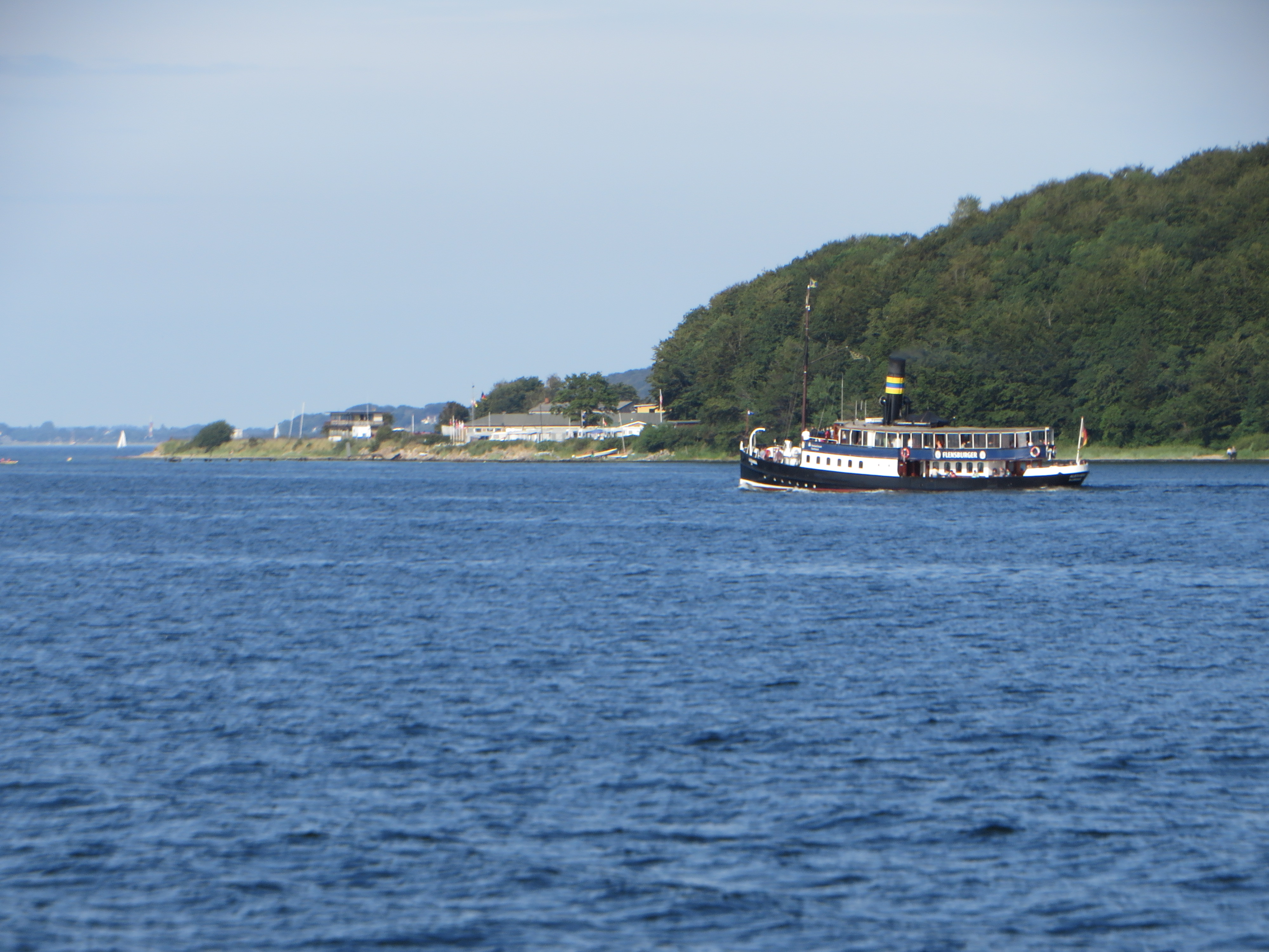 Alexandra bei Fahrensodde (Flensburg-Mürwik 2015), Bild 02